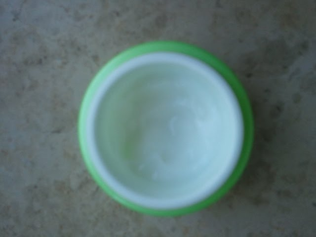 hidratantna krema za obraz, ki vsebuje glicerol vir: lasten arhiv (avtor slike: Urša Knific Terze, slika je bila posneta 21.03.2013)